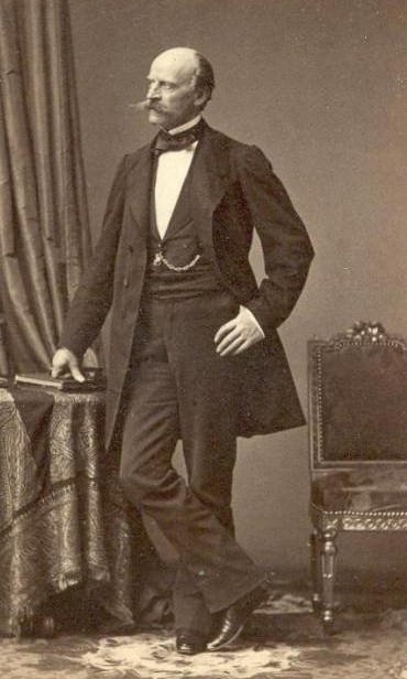 Альфонс Августинович Бетанкур